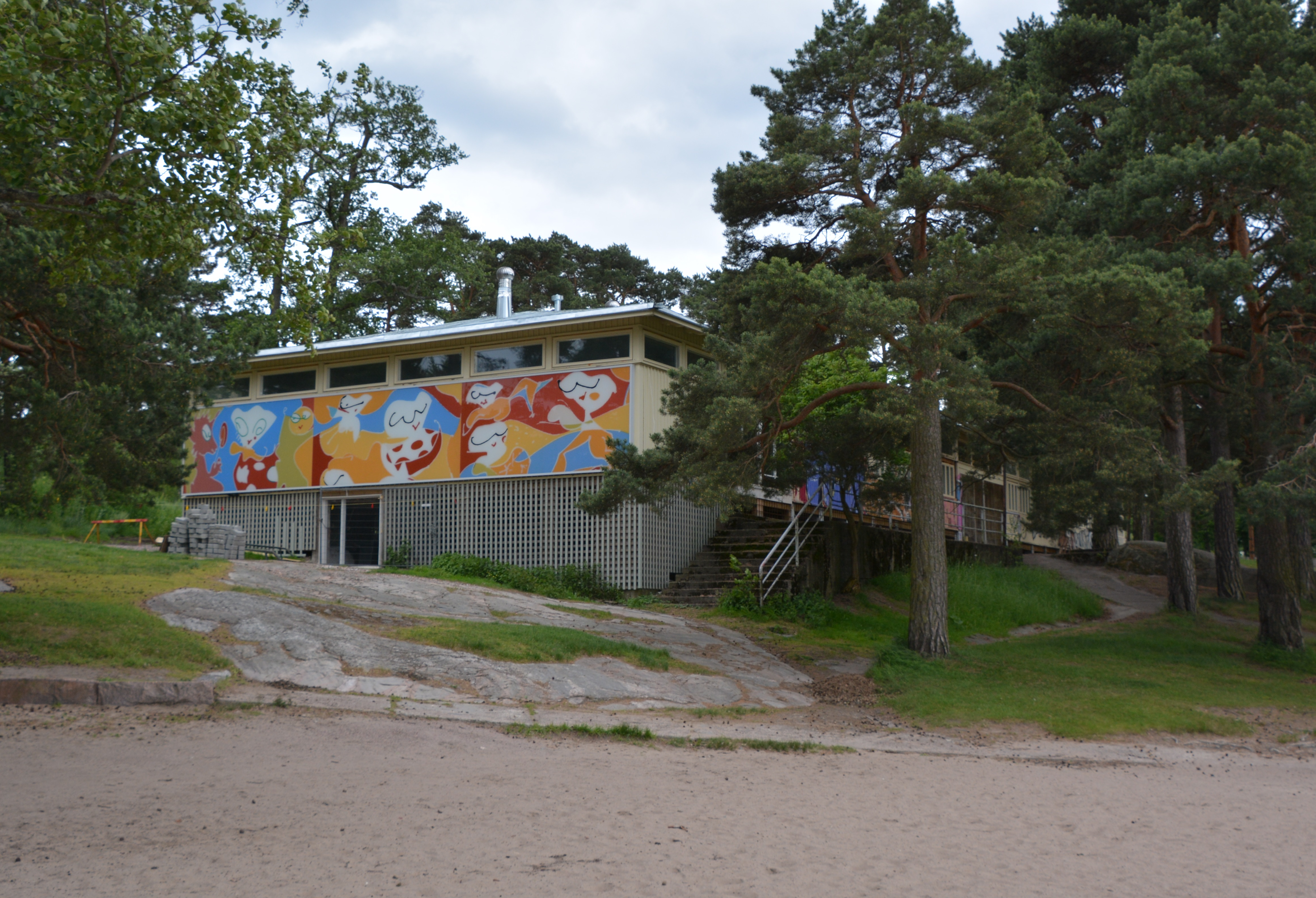 Sanduddspaviljongen, Sandudd, Helsingfors